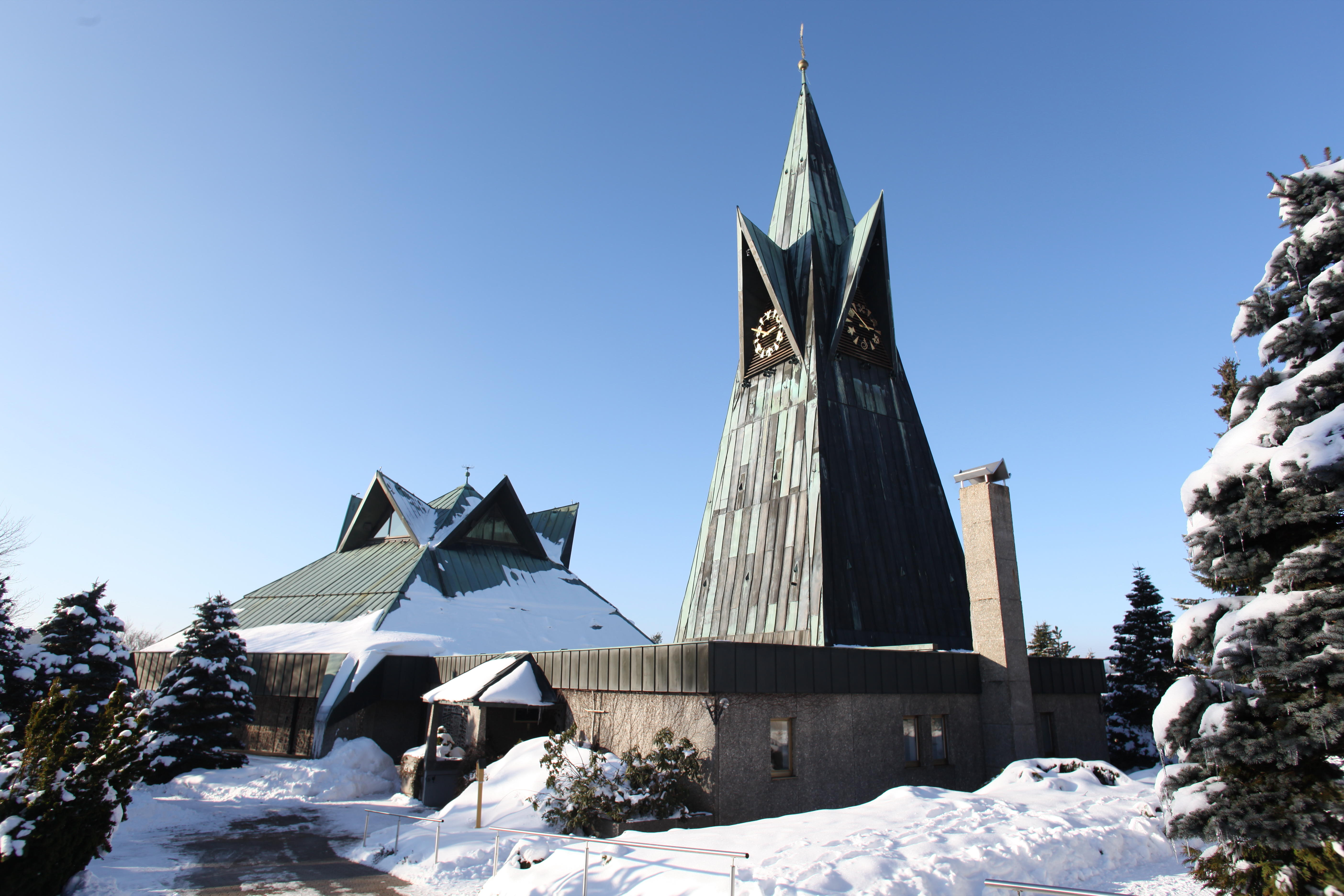 Pfarrkirche St. Laurentius in Buchbach, OT von Steinbach am Wald im Landkreis Kronach